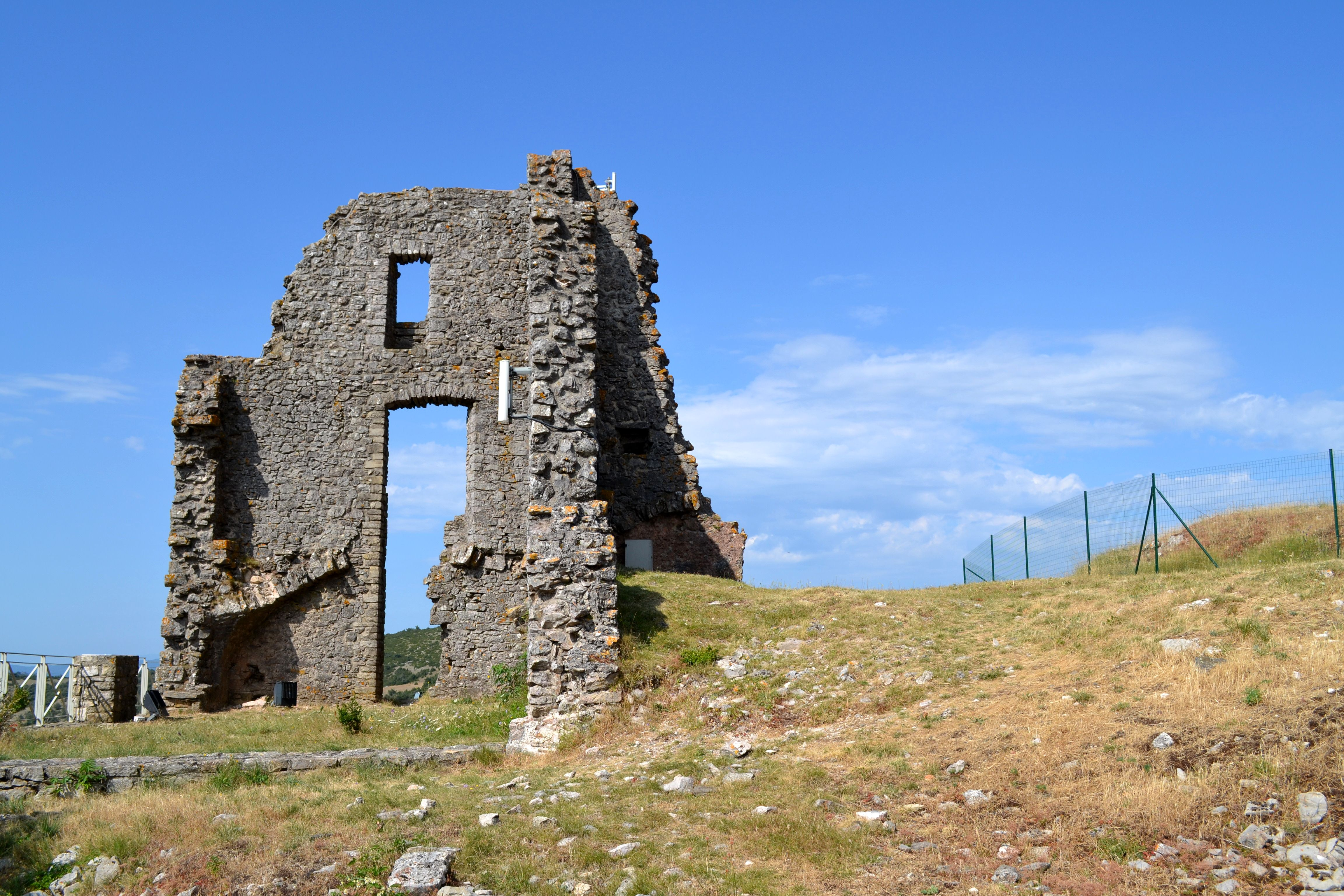 Ruines du château de Saint-Michel d'Alajou (34).